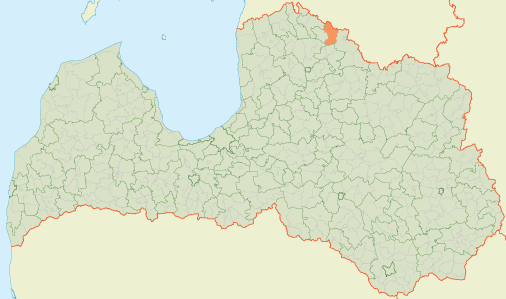 Ērģemes pagasts